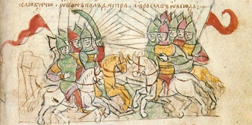 Битва Ярослава со Святополком под Любечем в 1016 году.